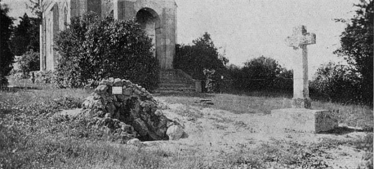 Détails Chapelle des Vierges à Sainte-Maure-de-Touraine